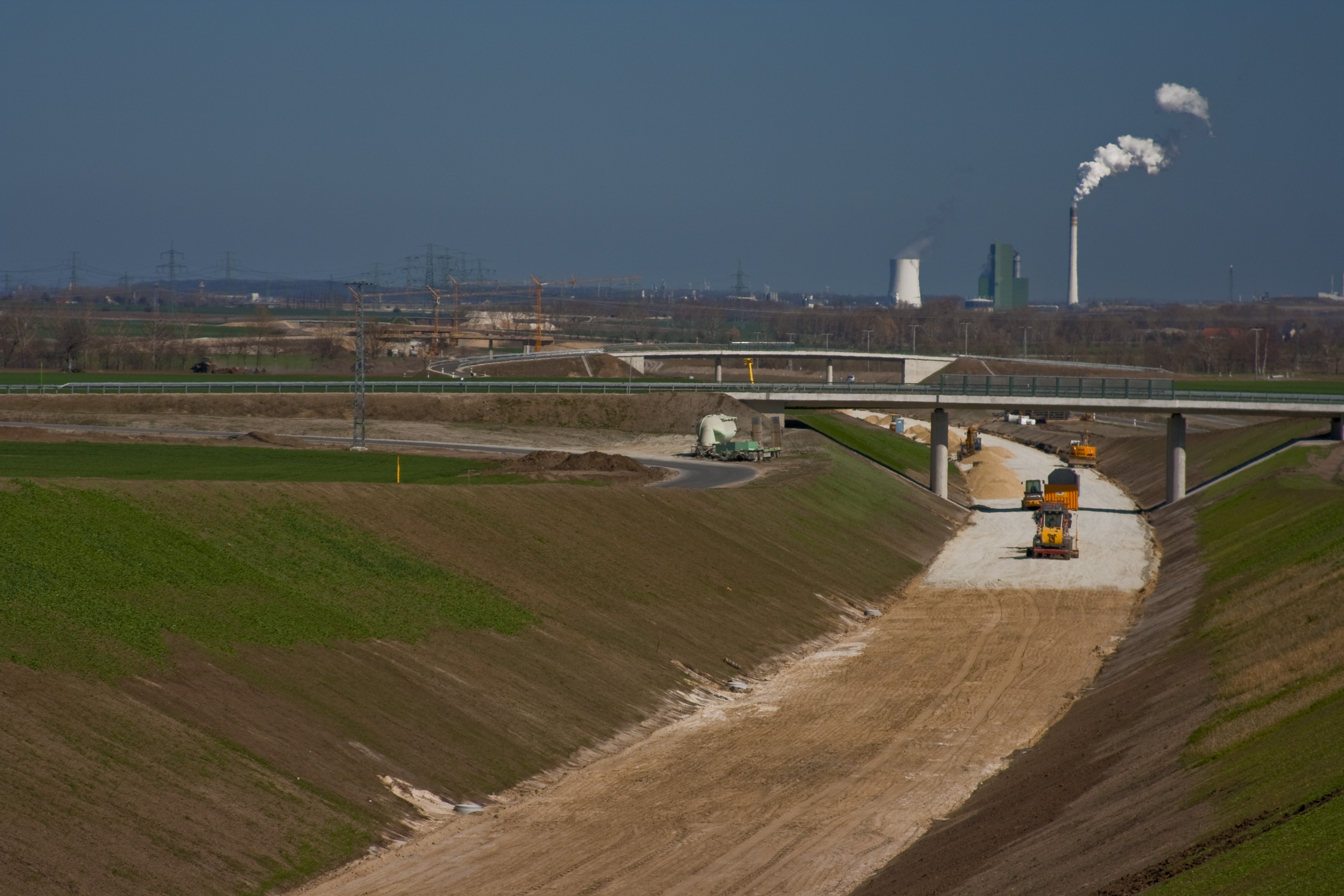 Neubaustrecke Erfurt - Leipzig-Halle - NBS km 260